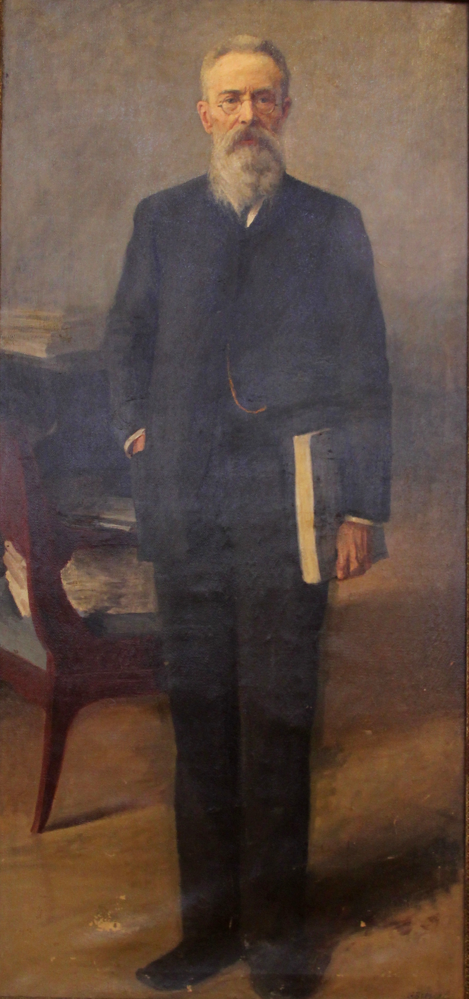 Портрет Н.А.Римского-Корсакова, холст , масло (Nikolai Rimsky-Korsakov)